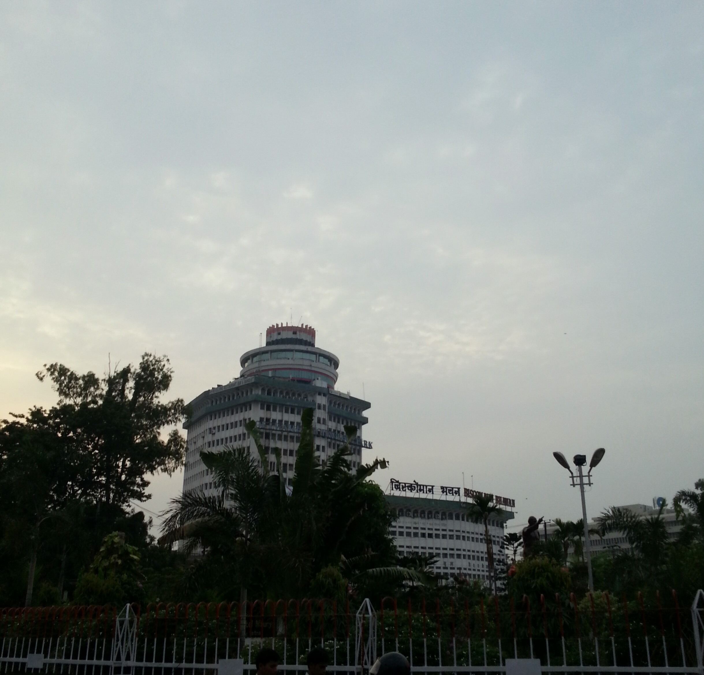 Biscomaun Bhawan, Patna